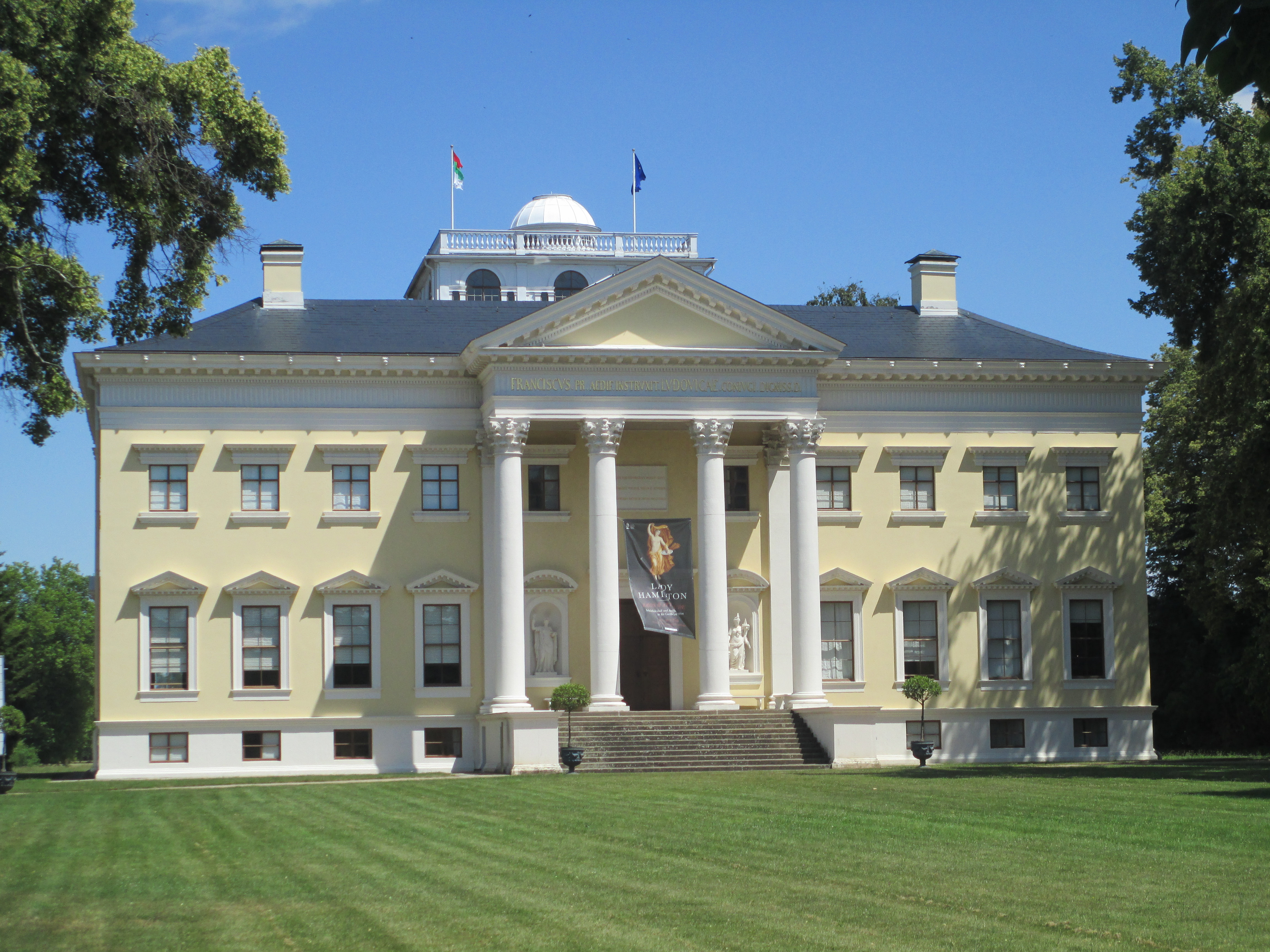 טירת וורליץ